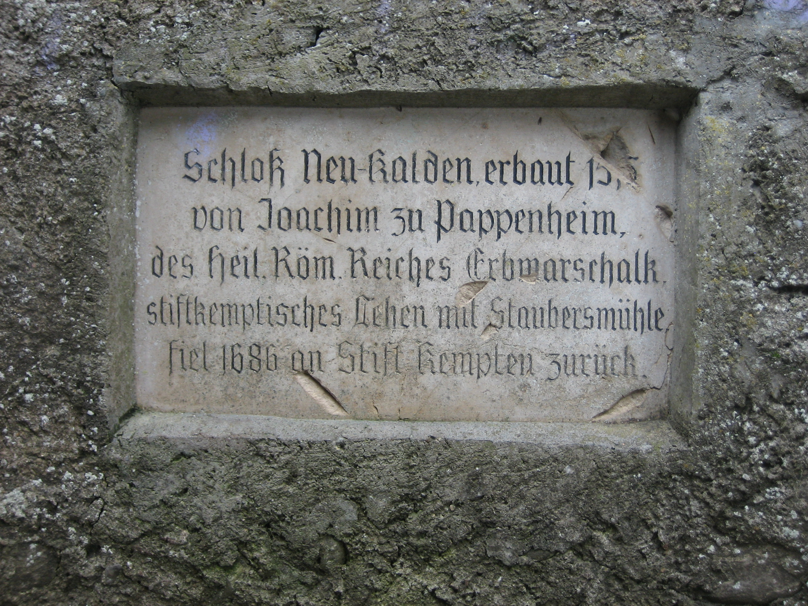 Burg Kalden, Altursried, Landkreis Unterallgäu, Bayern Erbaut 1515 Abbruch 1803/1840